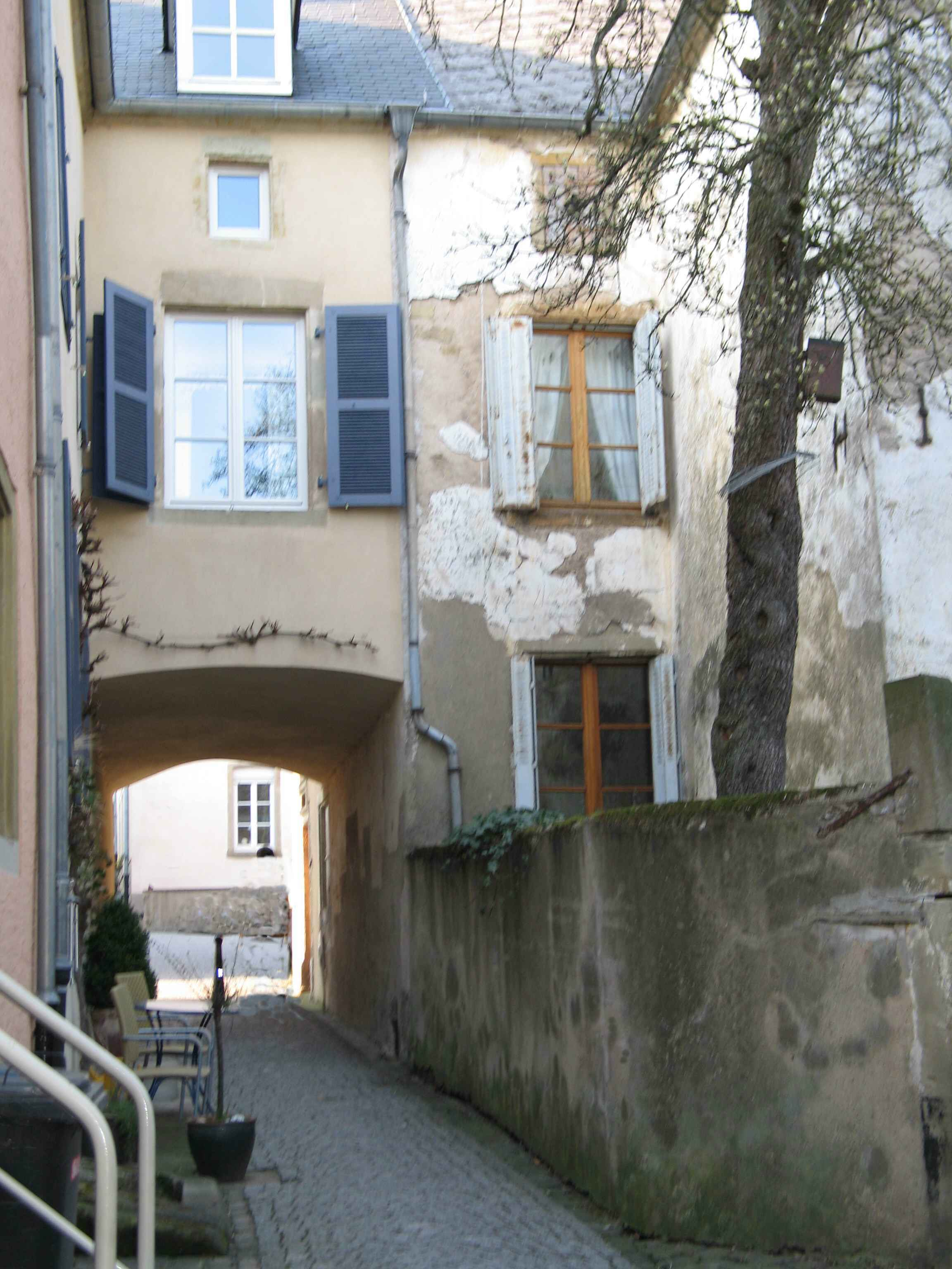 Sujet:An enger Gaass zu Éinen Source:Eege Foto User: Johnny Chicago Lizenz: GFDL